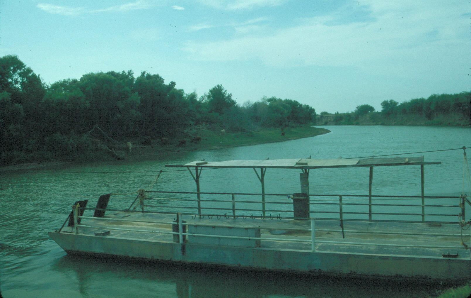 Goes between Los Ebanos, Texas and Ciudad Gustavo Díaz Ordaz, Tamaulipas.